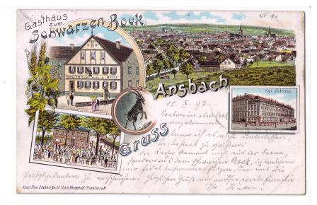 Handgezeichnete Postkarte des Hotel & restaurant Schwarzer Bock Ansbach mit Abbildung eines öffentlichen Brunnens und Pflasterung, wie sie heute nicht mehr existiert. Darstellung des Gasbeleuchteten Gartens mit Gartensaal und Kegelbahn.